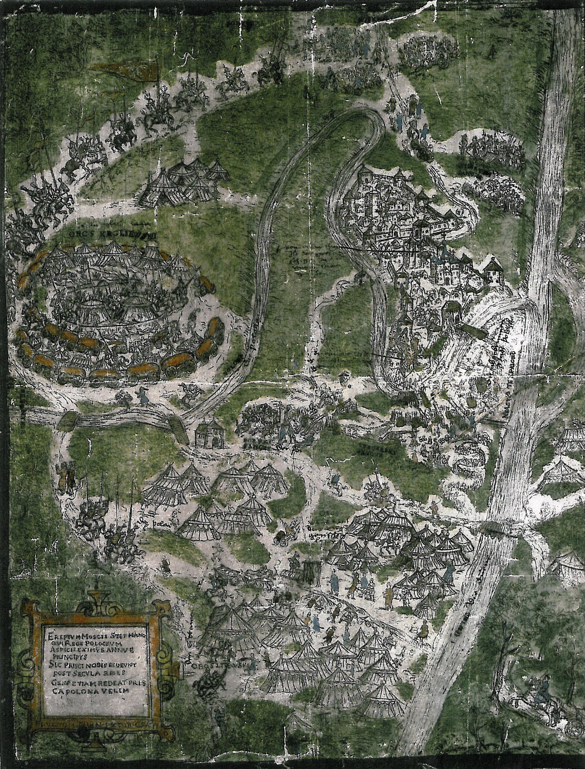 Беларуская (тарашкевіца): Полацак (Połacak). Плян аблогі і штурму